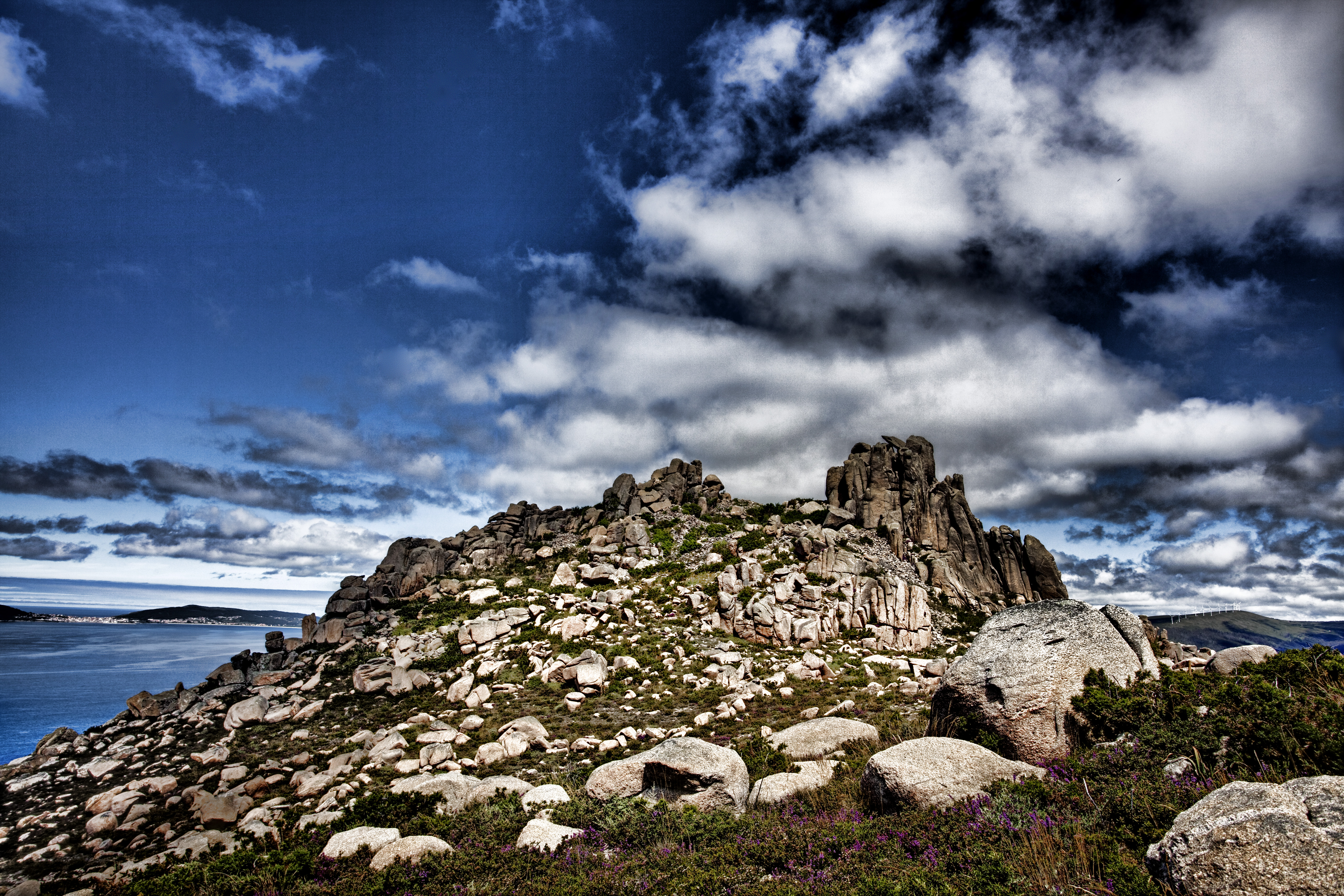 Castelo de San Xurxo, O Pindo, Galicia. No século X Sisnando (bispo de Iria Flavia) ordenou a construción do Castelo de San Xurxo nas beiras do monte Pindo, para protexer estas terras dos continuos ataques dos piratas medievais. Diversas familias nobres de Galiza habitárono ata que o castelo foi destruido no ano 1467 nas Revoltas Irmandiñas. Dise que fai cincuenta anos aínda se podían ver parte dos seus muros, desfeitos polos buscadores de tesouros